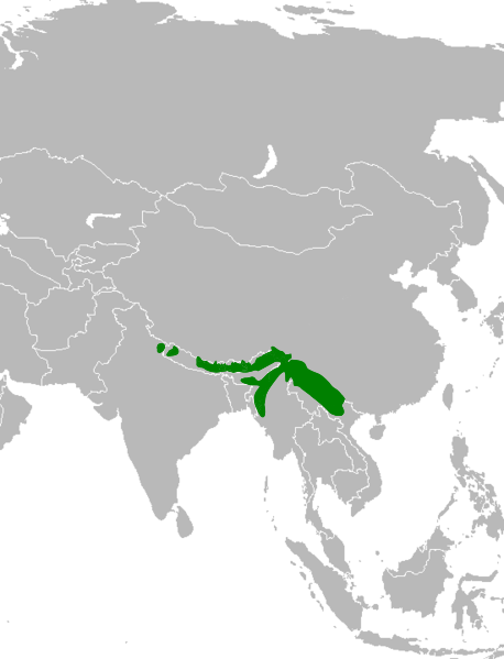 Cette carte montre la distribution géographique de l'hirondelle de Népal. Carte créée d'après le modèle suivant